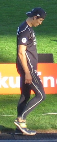 Petteri Lax Paavo Nurmen kisoissa, Paavo Nurmen stadionilla, Turussa, 24. kesäkuuta 2009